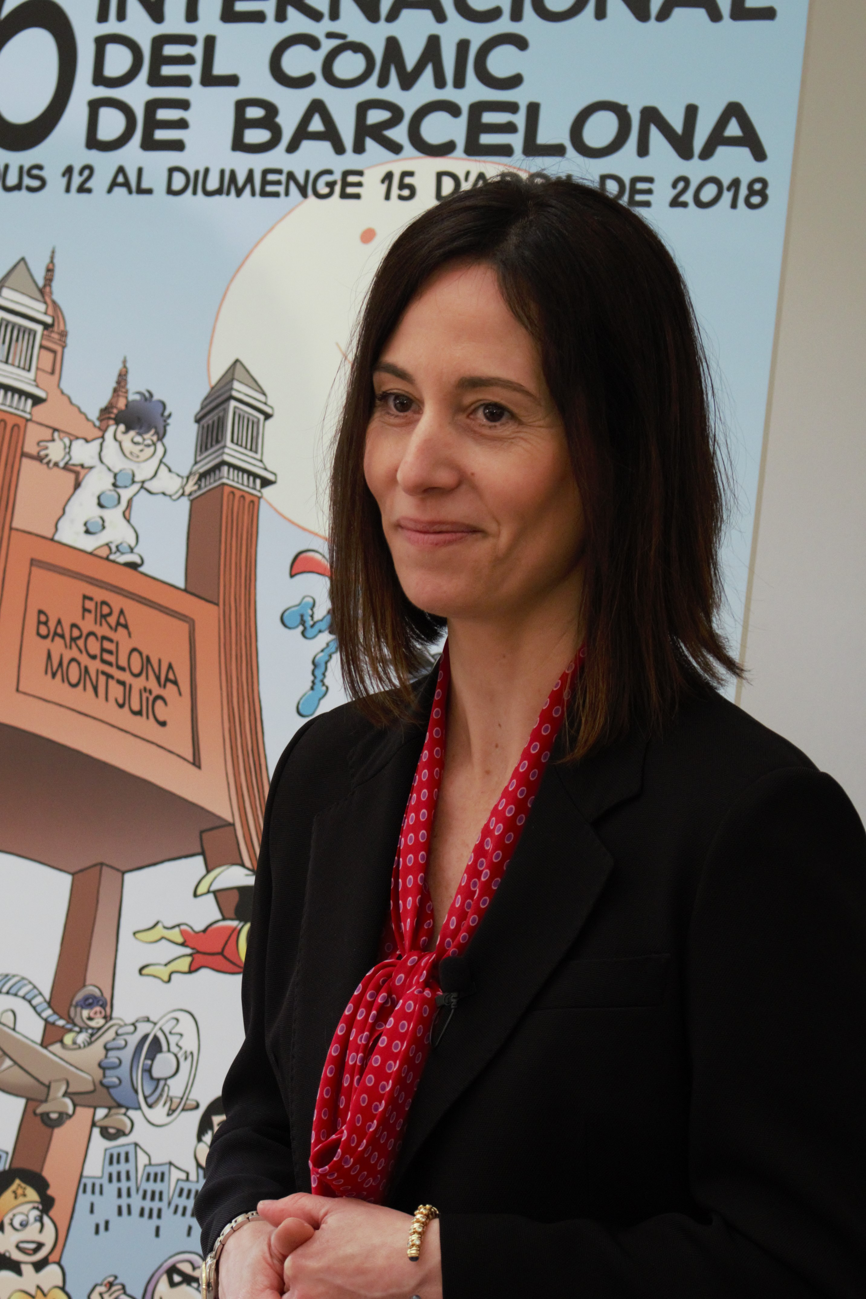 Meritxell Puig, directora de Ficomic. Saló Internacional del Còmic de Barcelona de 2018